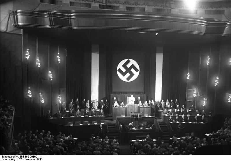 Der neugewählte Reichstag während seiner ersten Sitzung am 12. Dezember 1933 in der Krolloper bei der Ansprache Hermann Görings.